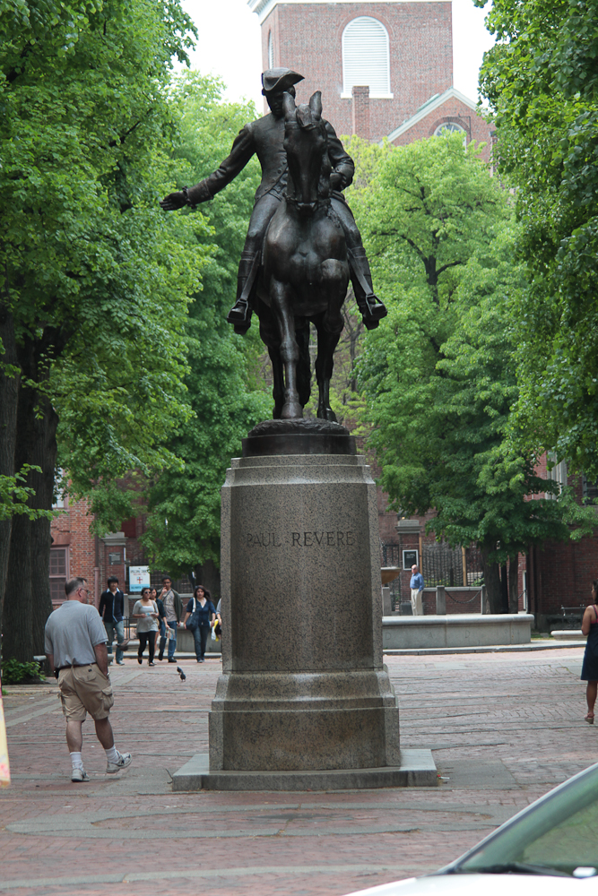 Boston 2010-05-02-15